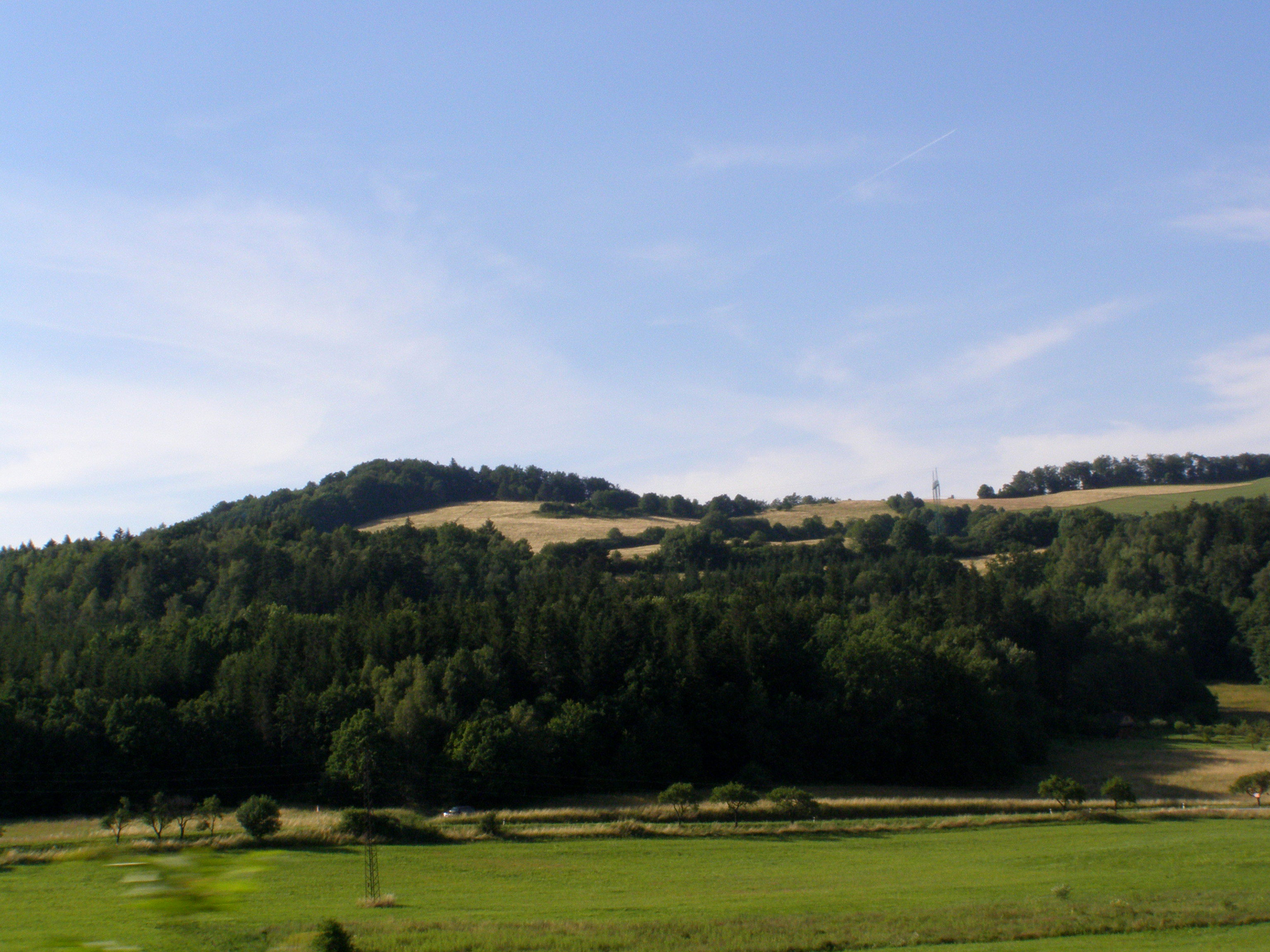 Šostýnké vrchy, vrchol Na Peklech (503 m)